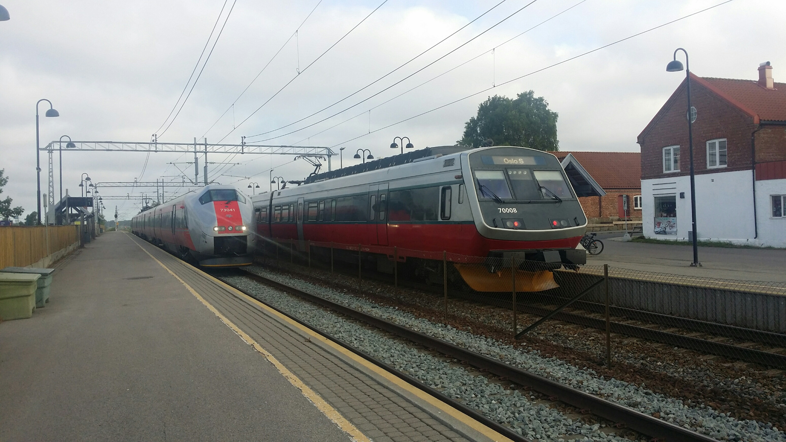 To tog møtes på Rygge stasjon.